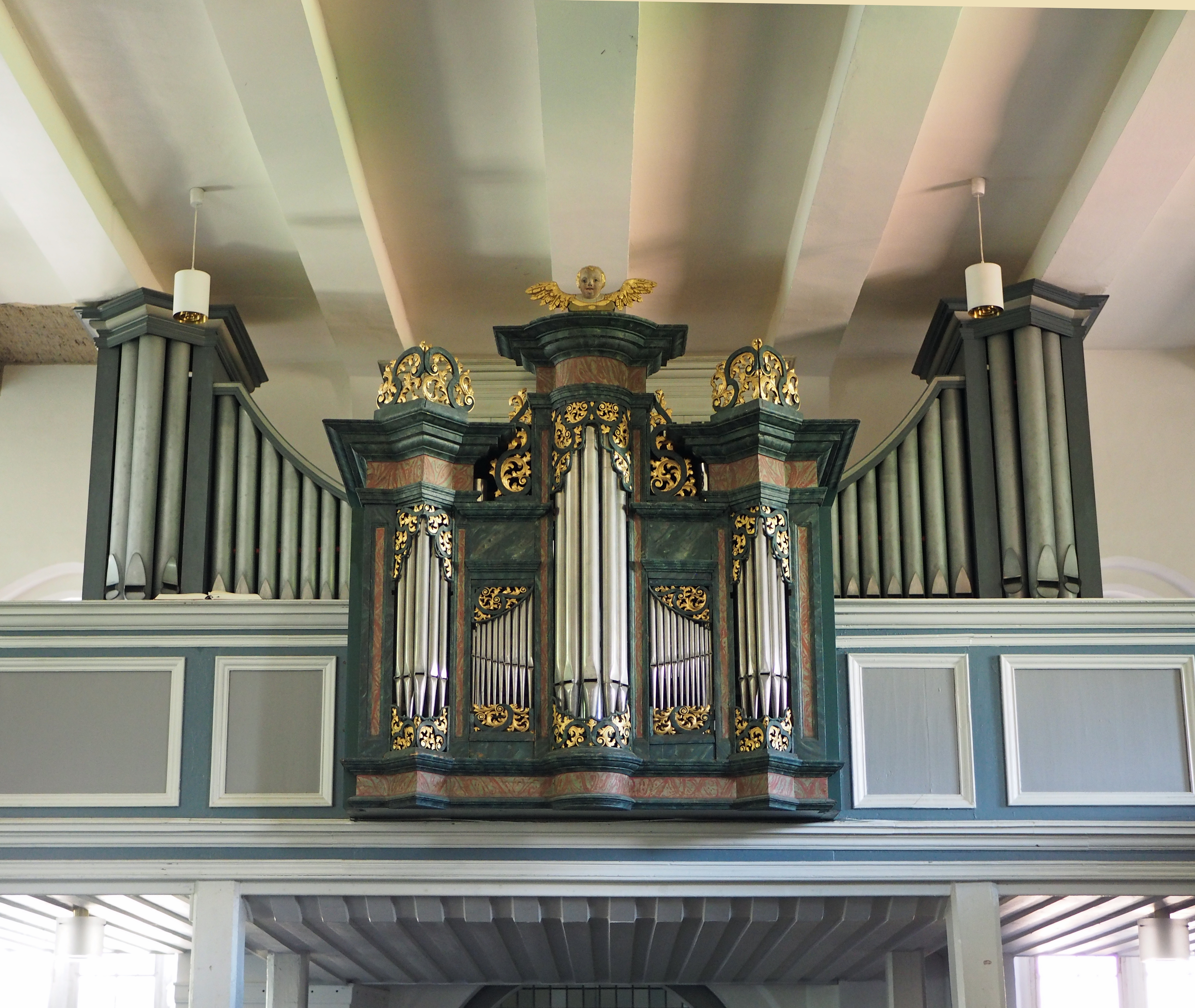 Orgel in der St. Georg-Kirche, Blumlage, Celle